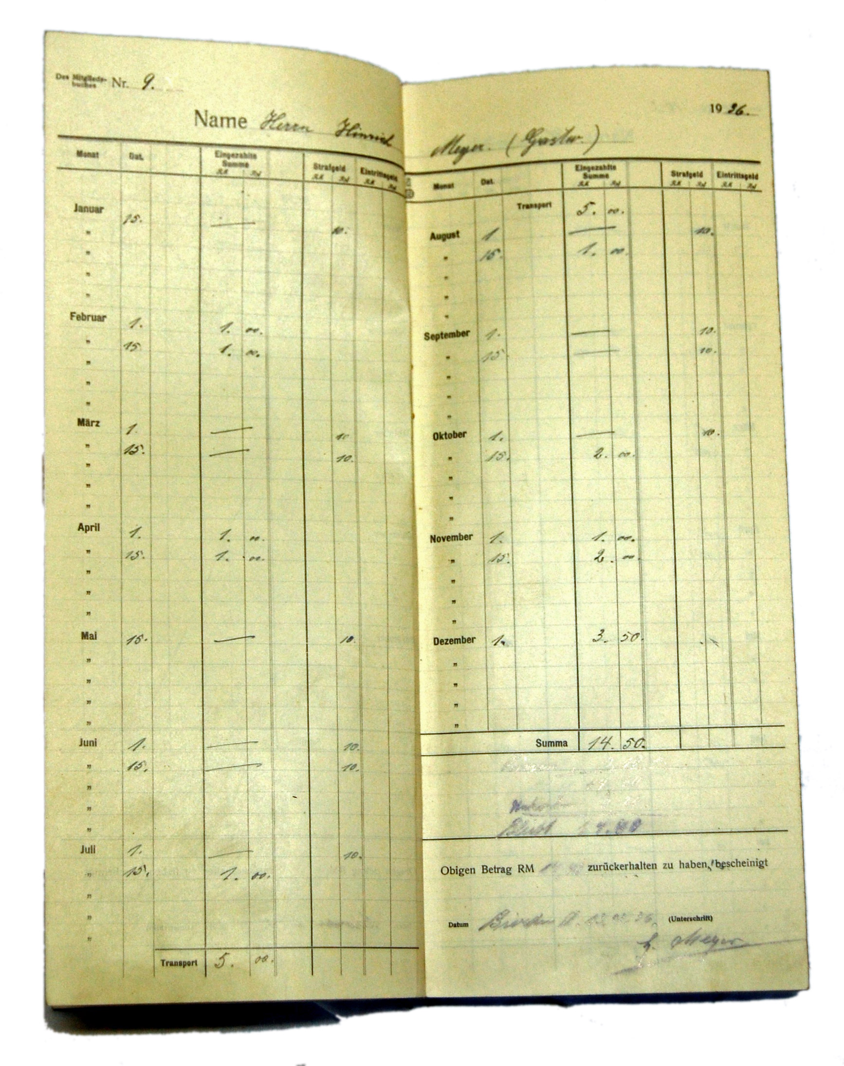 Kassenbuch des "Sparklub Einigkeit Bierden" aus 28832 Achim / Niedersachsen, 1936